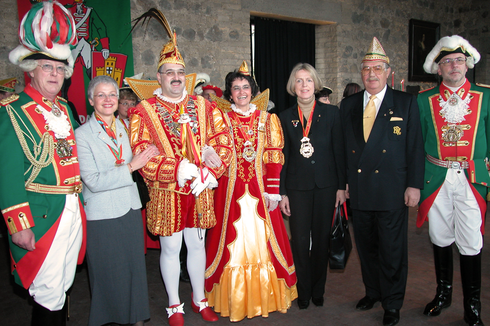 Die Godesberger Stadtsoldaten feierten 2004 ihr 111-jähriges Bestehen mit einem Festkommers auf der Godesburg. Von links: Horst Effelsberg (2004: Vorsitzender, 2010: Ehrenvorsitzender), Annette Schwolen-Flümann (Bezirksbürgermeisterin Bad Godesberg, Prinzenpaar Peter IV. und Godesia Silke, Bärbel Dieckmann (OB Bonn), Rolf Höhn (BDK), Dieter Nussbaum (2004: stellvertr. Vorsitzender, 2010: Vorsitzender)